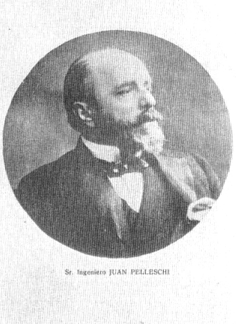 Ing. Giovanni Pelleschi - Foto propiedad de sus descendientes